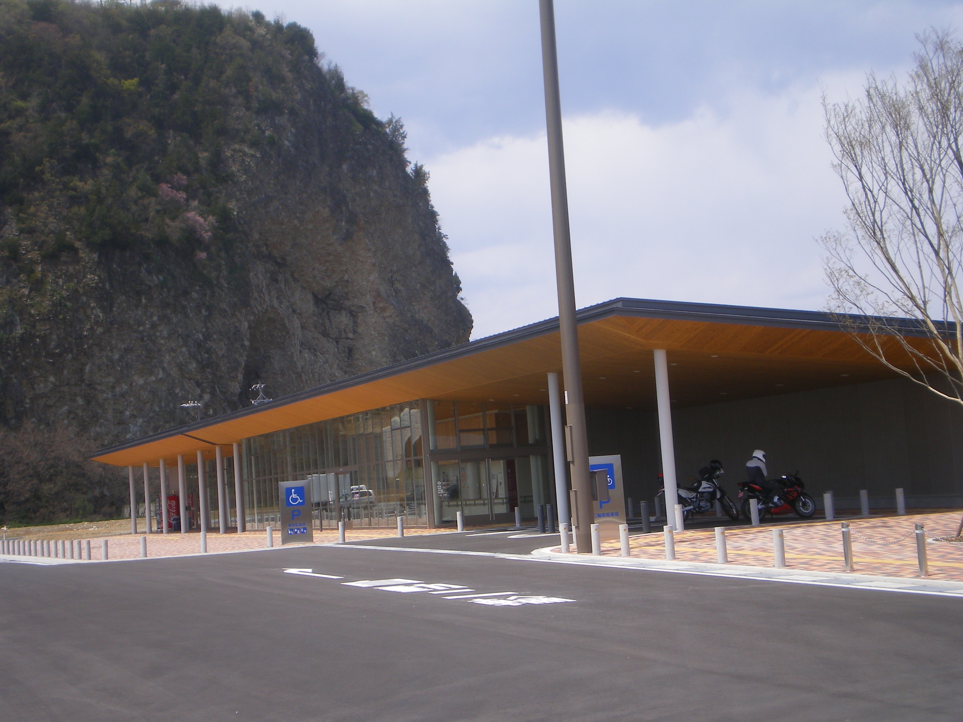 長野県上田市にある、上田道の駅を撮影した画像